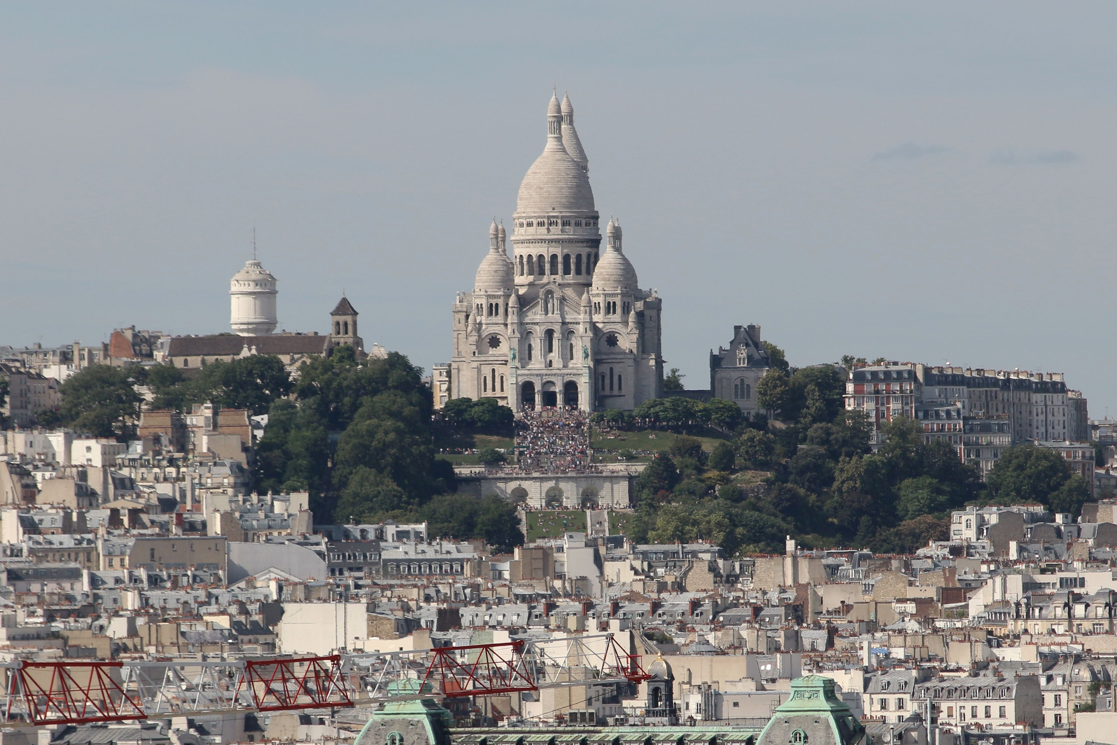 La basilique du Sacré-Coeur vue depuis la tour Saint-Jacques